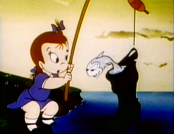 Little Audrey en una escena de 'The Seapreme Court' (1954). La caricatura está en dominio público.